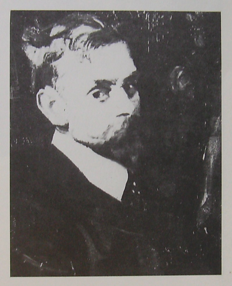 Albert Weisgerber: Bildnis des Bildhauers Alfred Lörcher (Öl, 1904); Saarland Museum